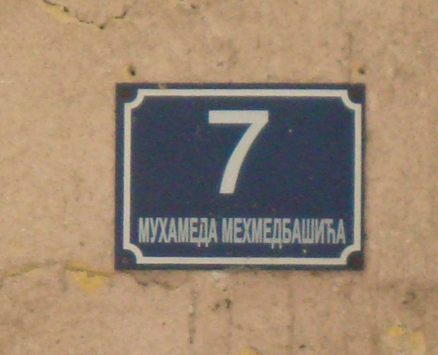 Улица_Мухамеда_Мехмедбашића_у_Бањој_Луци